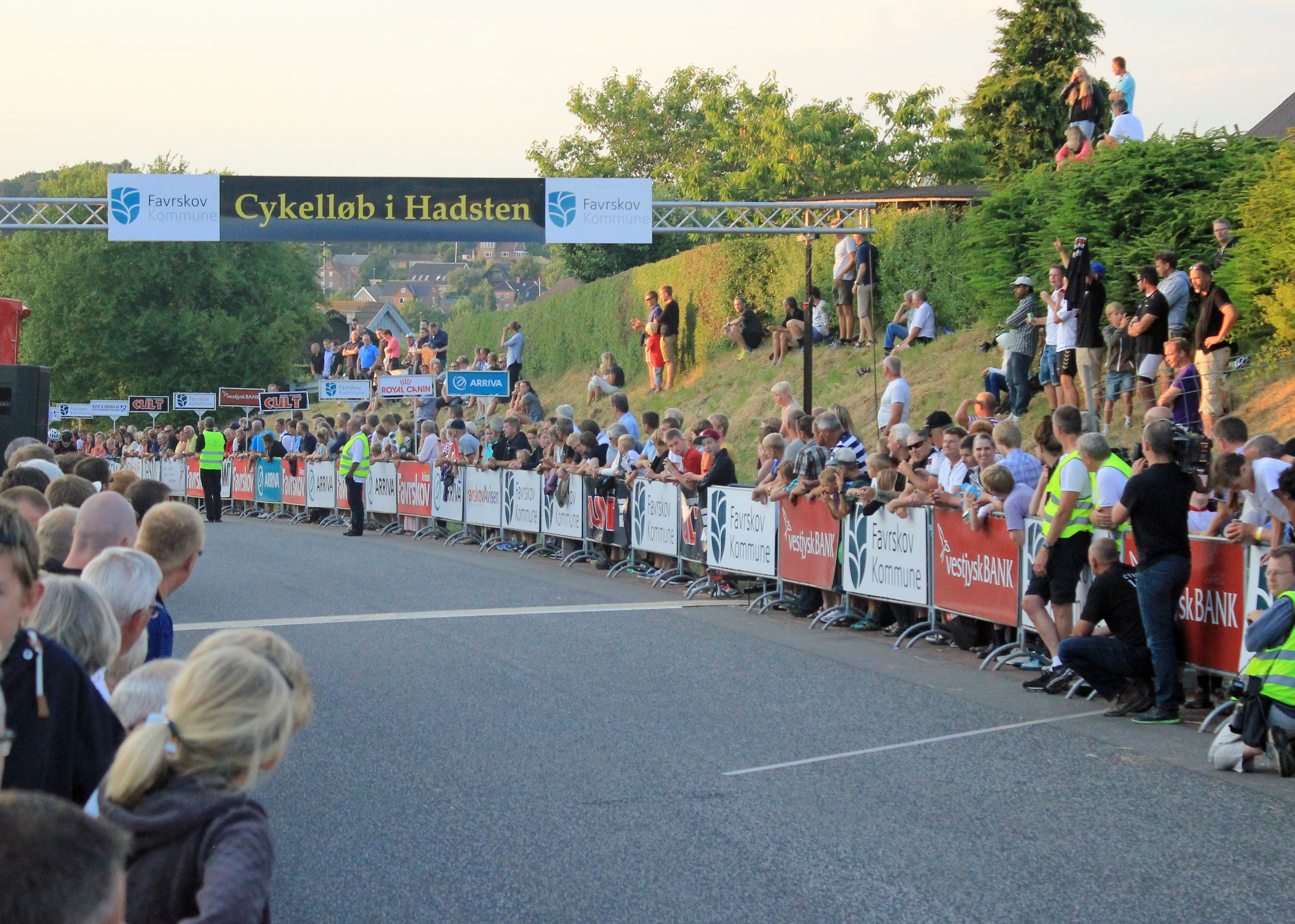 2013 udgaven, 20 års jubilæum